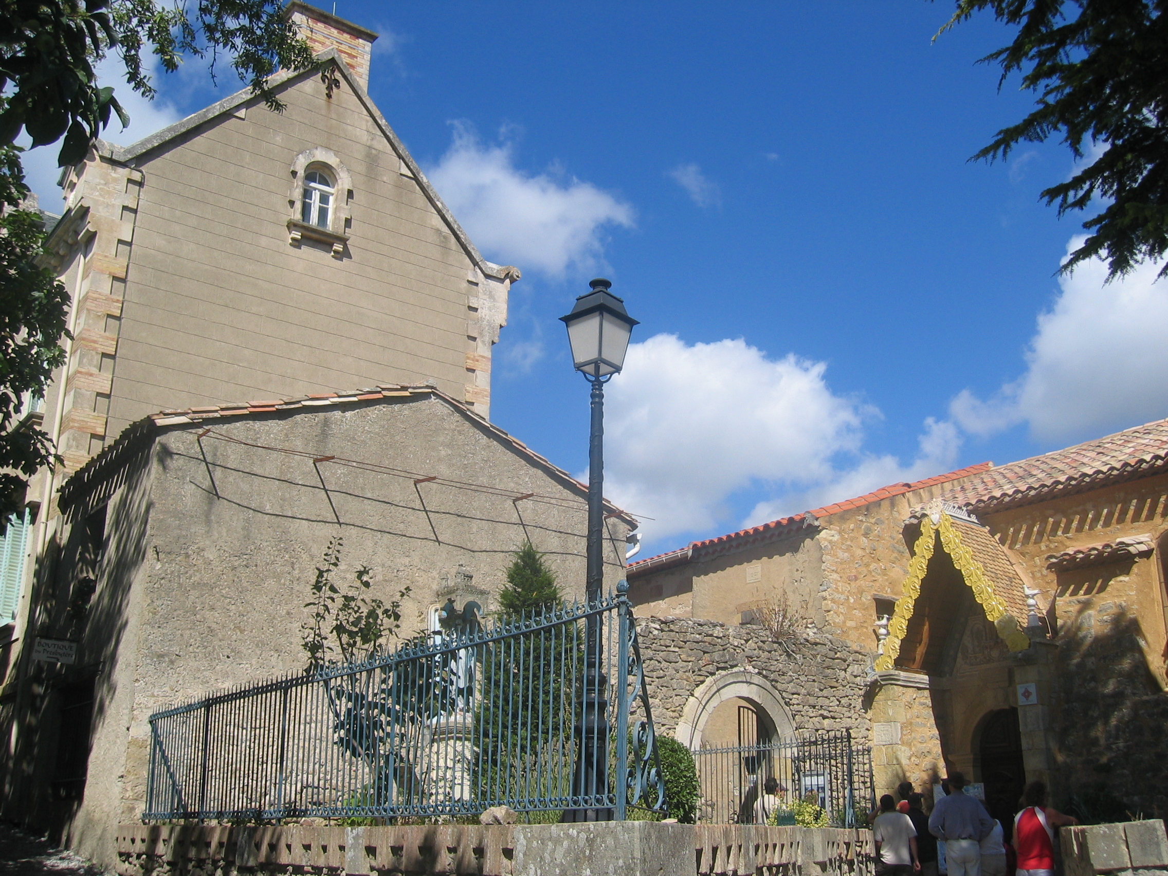 Villa Bethanie